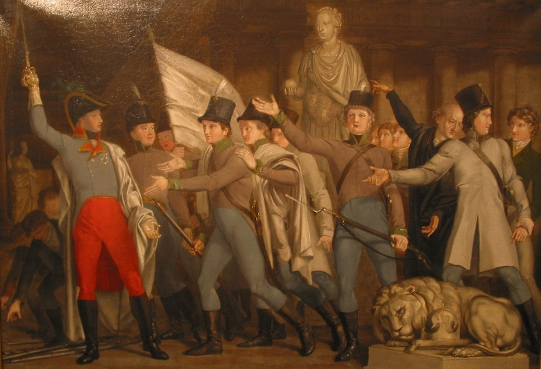 Zu den Waffen. Erzherzog Karl mit Vertretern des böhmisch-mährischen Studenten-Leibbataillons im Prager Clementinum